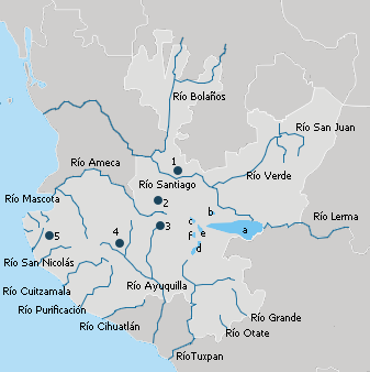 Mapa hidrográfico de Jalisco Simbología Presas Presa de Santa Rosa. Pesa La Vega. Presa de Las Piedras. Presa de Tacotán. Presa Cajón de Peña. Lagos y lagunas a. Lago de Chapala. b. Laguna de Cajititlán. c. Laguna de Atotonilco. d. Laguna de Sayula. e. Laguna de San Marcos. f. Laguna de Zacoalco.